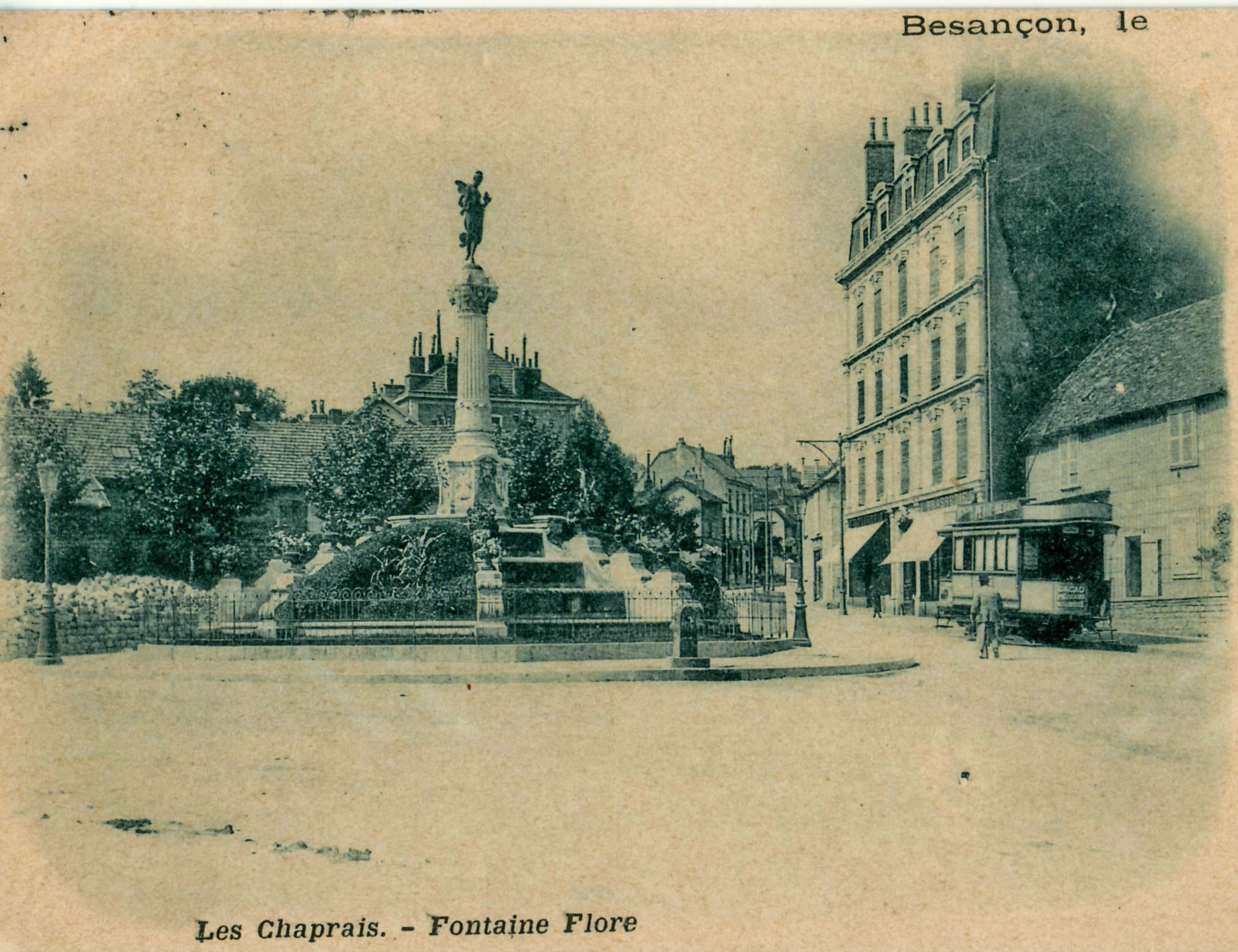 Cliché de la carte postale ancienne, sans mention d'éditeur : Besançon - Les Chaprais - Fontaine Flore A droite, vue d'une rame de l'ancien tramway de Besançon